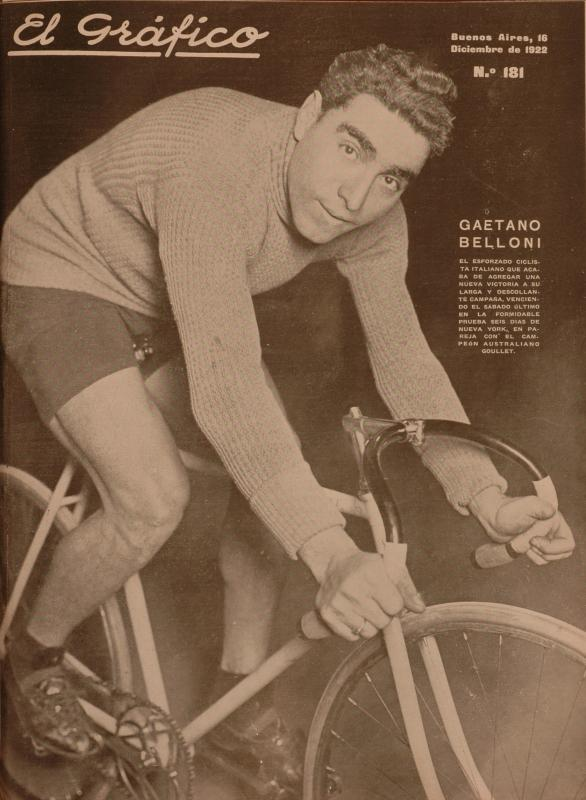 Coberta de la revista "El Gráfico": Gaetano Belloni-1922